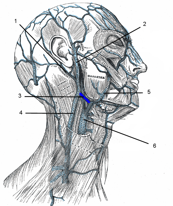 V. retromandibularis Description V. retromandibularis Plate557Datebefore 1858 date QS:P,+1858-00-00T00:00:00Z/7,P1326,+1858-00-00T00:00:00Z/9Source Henry Gray (1918) Anatomy of the Human Body (See "Book" section below) : Gray's Anatomy, Plate 557Author Henry Vandyke Carter (1831–1897) Alternative names H. V. CarterDescriptionEnglish anatomist, surgeon and artistDate of birth/death 22 May 1831 4 May 1897Location of birth/death Kingston upon Hull ScarboroughAuthority control : Q955620 VIAF: 68771670 ISNI: 0000 0000 6405 0921 LCCN: nr00037105 Open Library: OL5854674A Oxford Dict.: 50532 WorldCat creator QS:P170,Q955620 V. retromandibularis